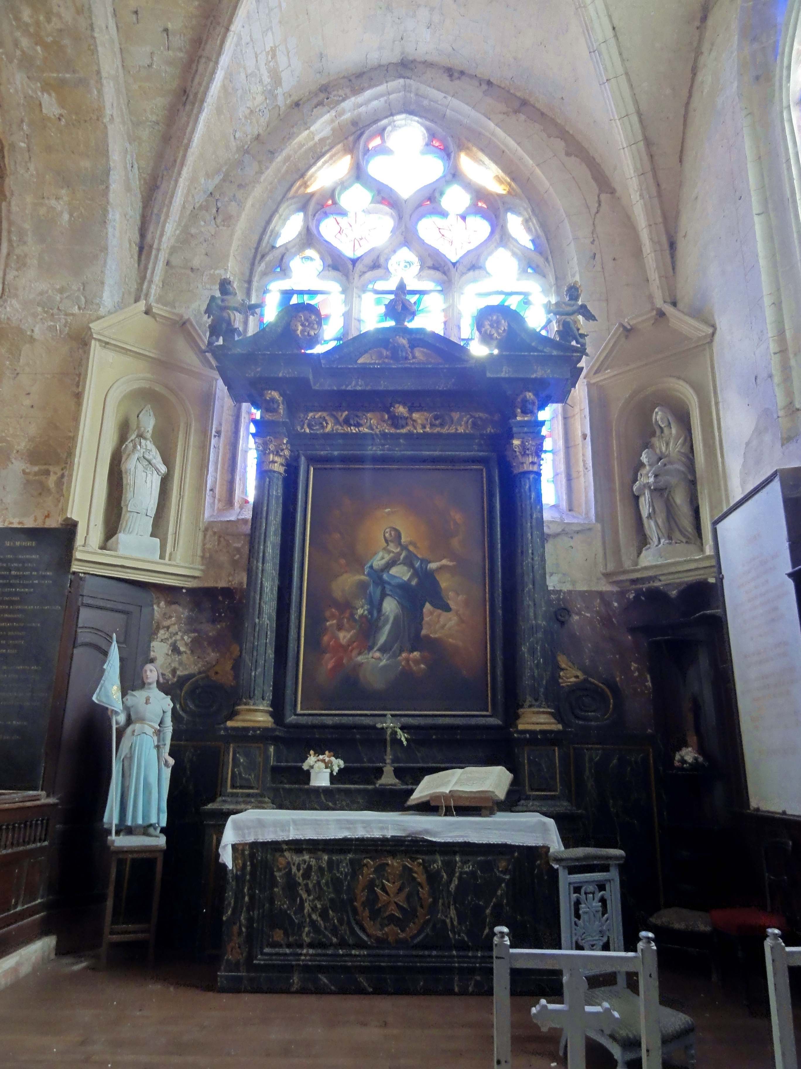 Intérieur de l'église Saint-Pierre-et-Saint-Paul (voir titre).